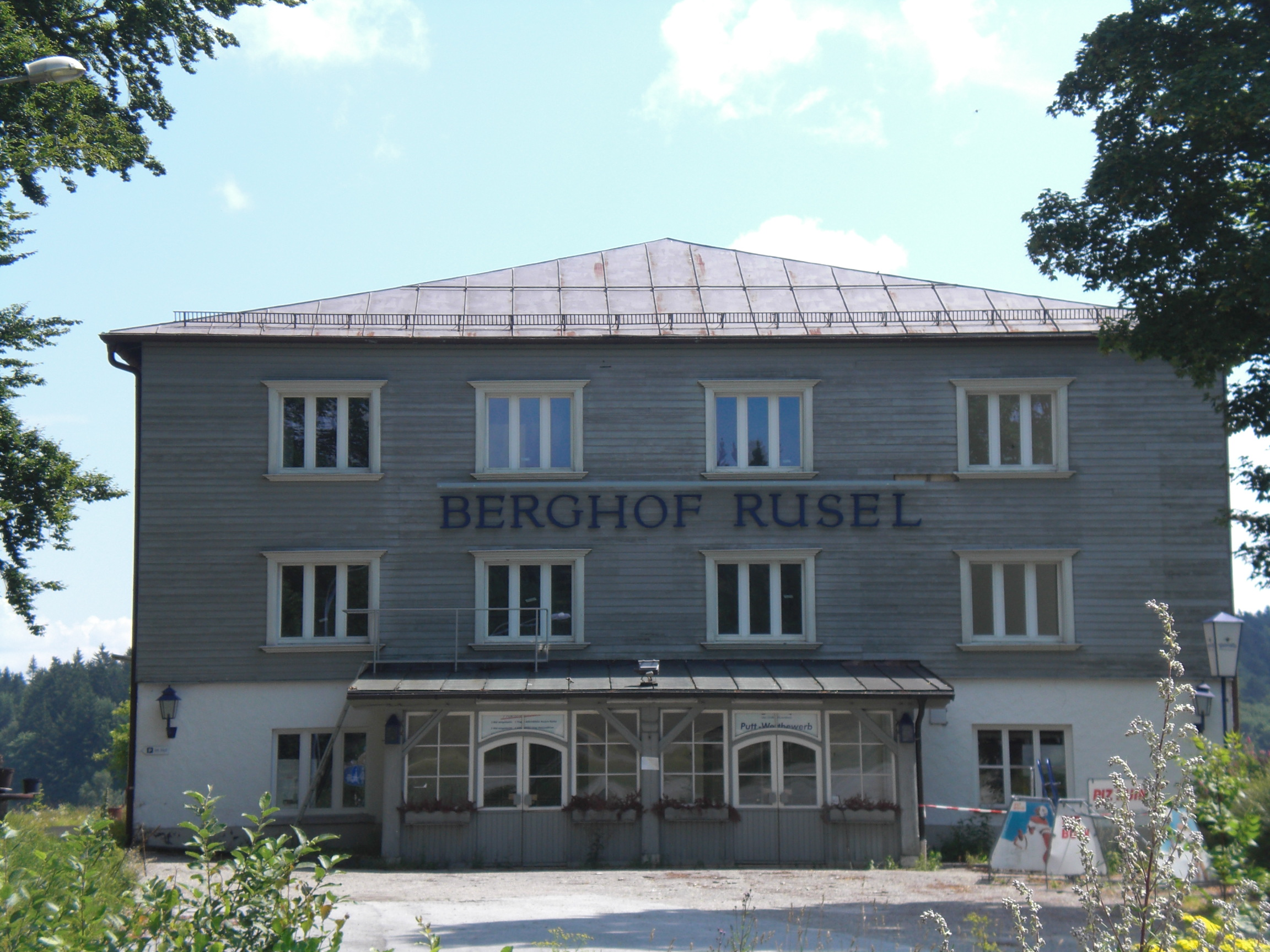 Ehemaliges Lunkgensanatorium - heute Gasthaus - auf der Rusel